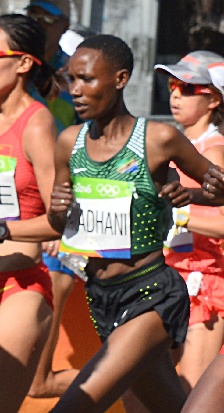 Passage du marathon des jeux olympiques de Rio 2016 dans le centre de Rio